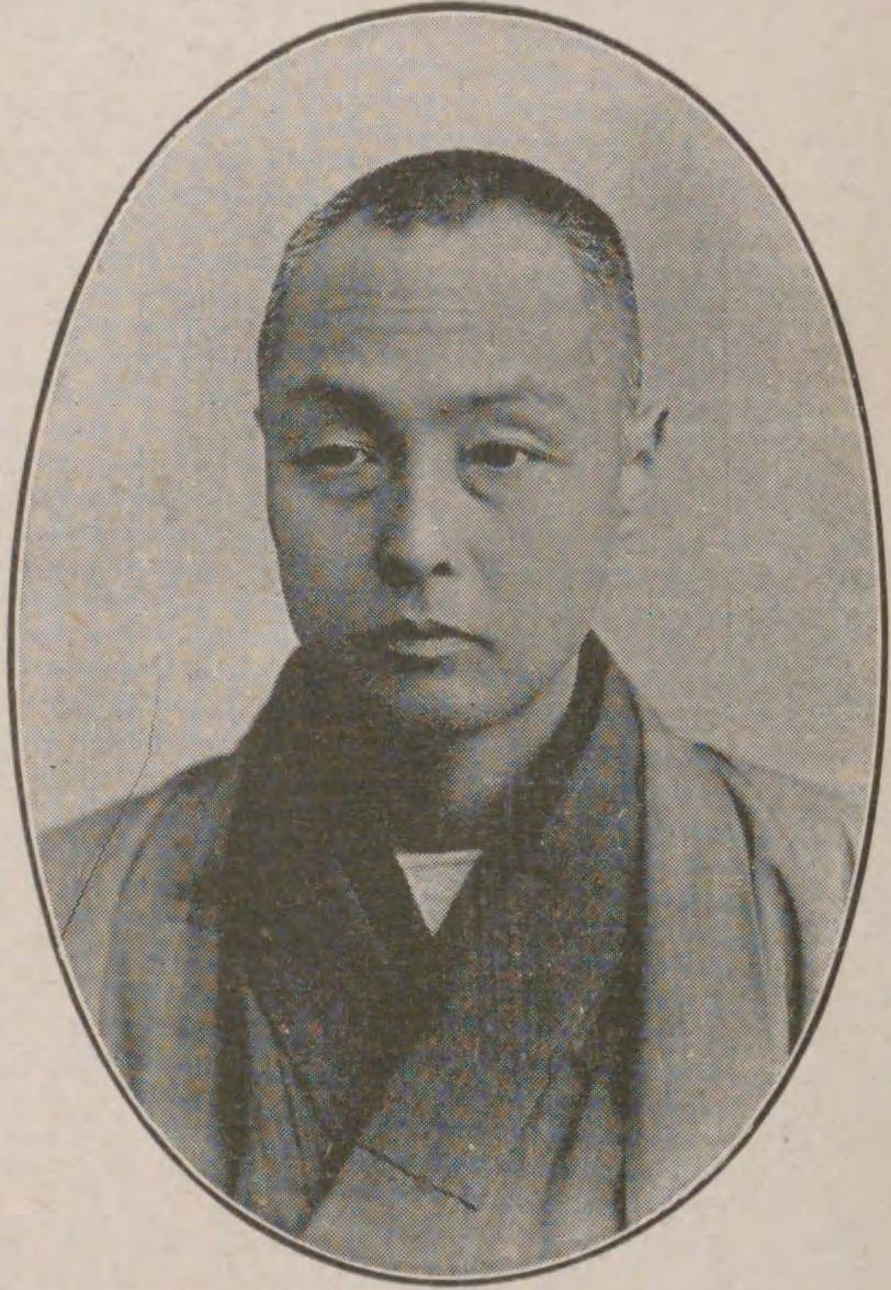 斎藤善右衛門 46歳（明治32年）